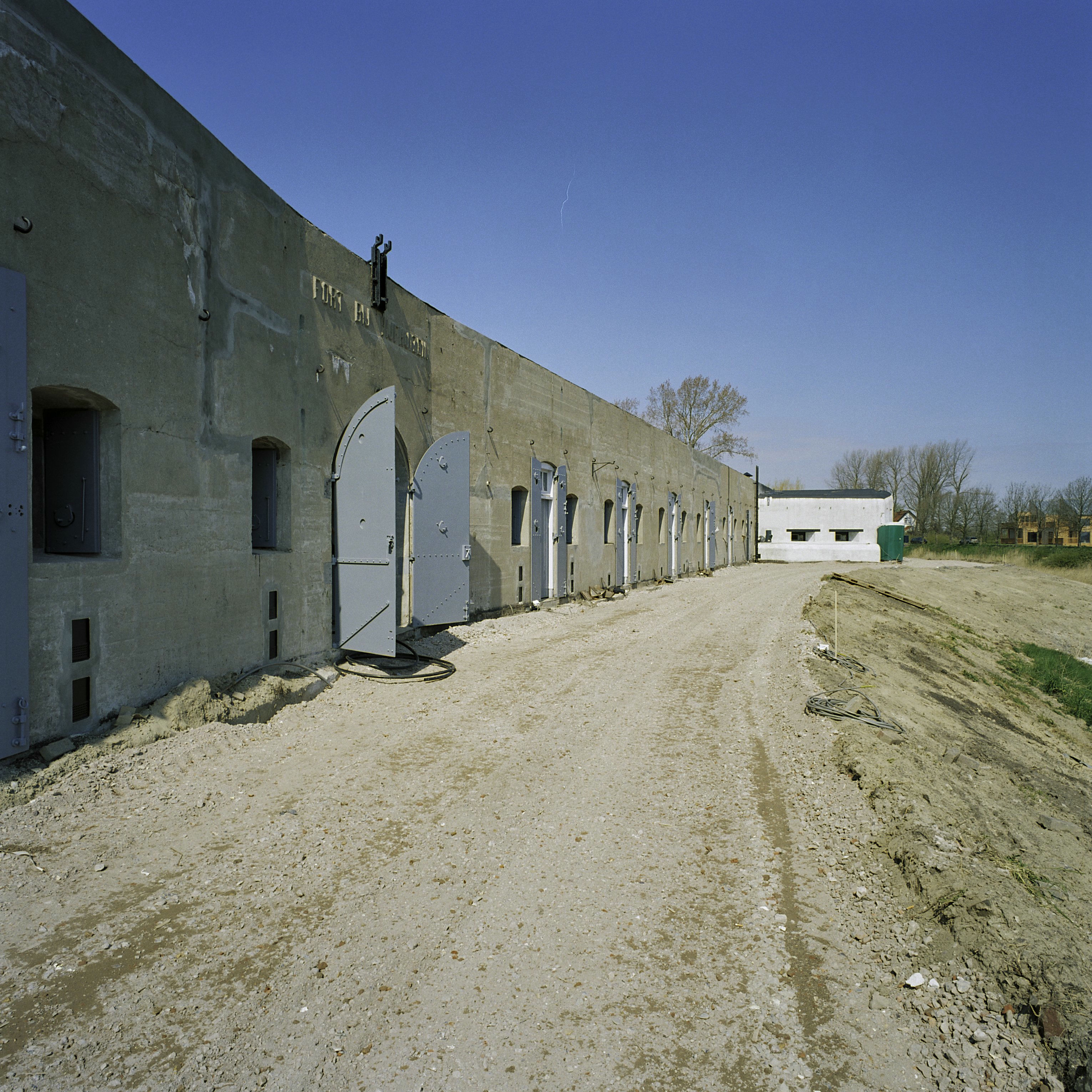 Fort Vijfhuizen, voormalig: De keelzijde van het Fort (opmerking: Gefotografeerd voor Monumenten In Nederland Noord-Holland)